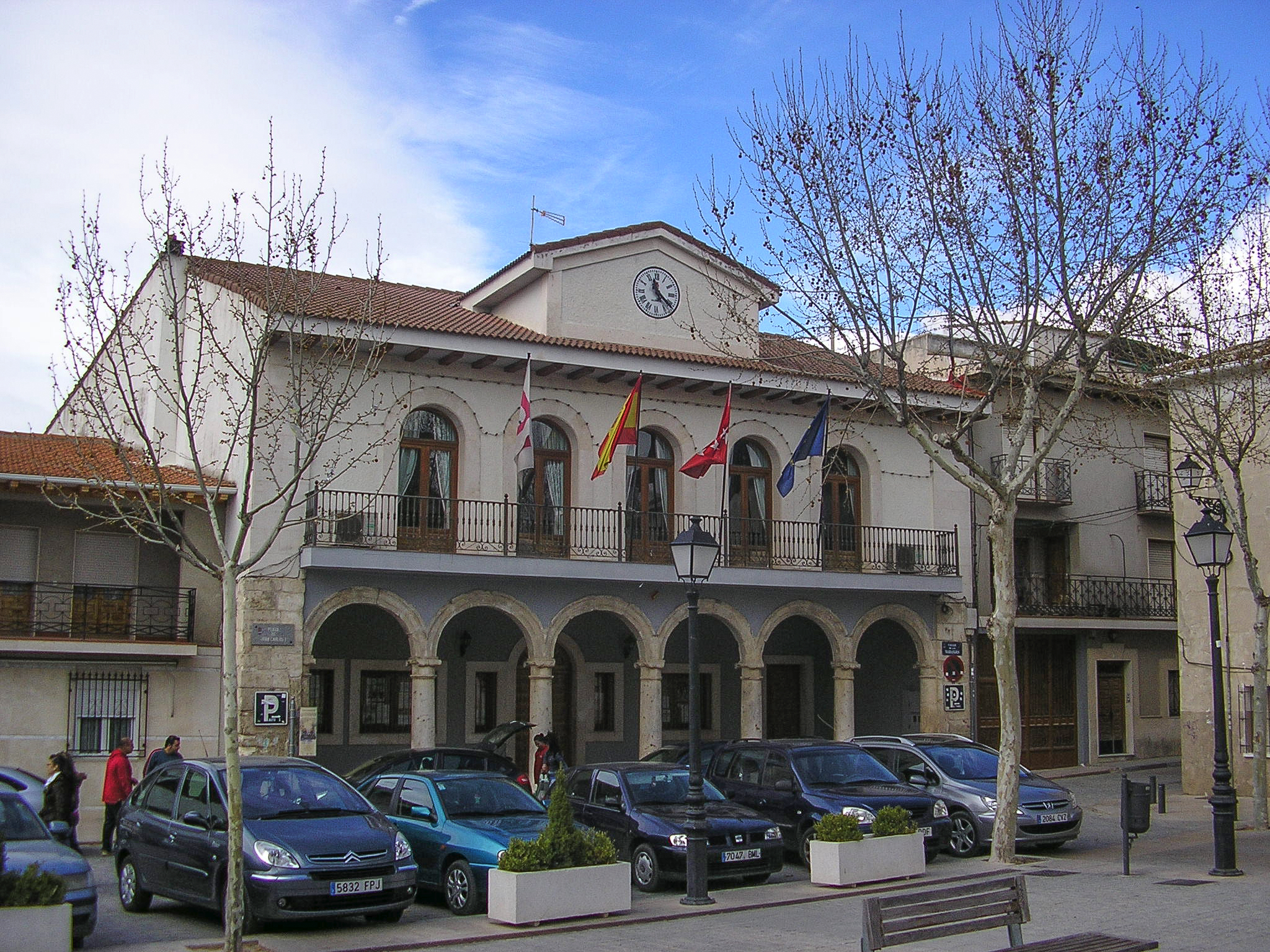 El Ayuntamiento de Estremera, un pueblo que está en la Comunidad Autónoma de Madrid, a 65 km de la capital de España.